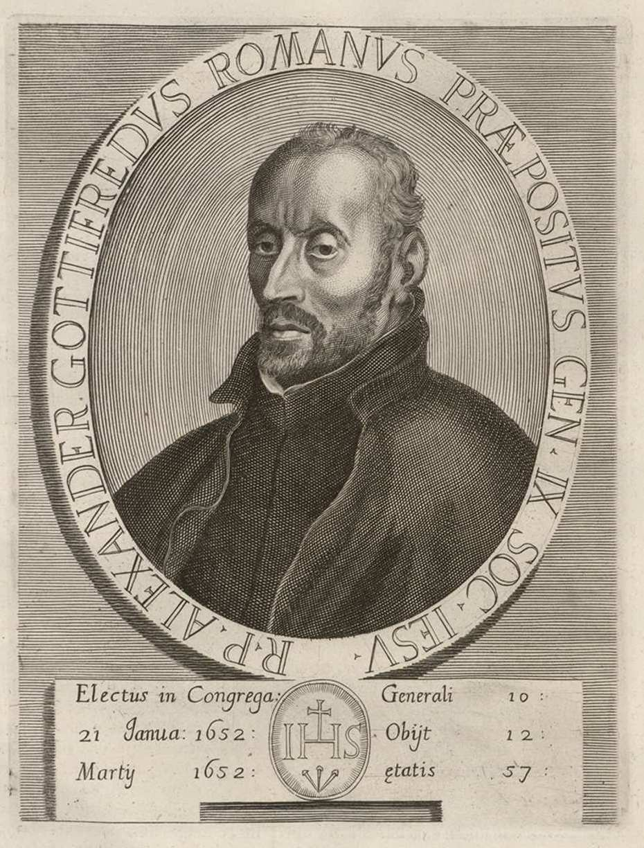 Luigi Gottifredi- Grabado de Arnold von Westerhout para los "Ritratti de' prepositi generali della Compagnia di Gesù delineati, ed incisi da Arnaldo Van Westherhout", Roma, 1748. Biblioteca Nacional de España.